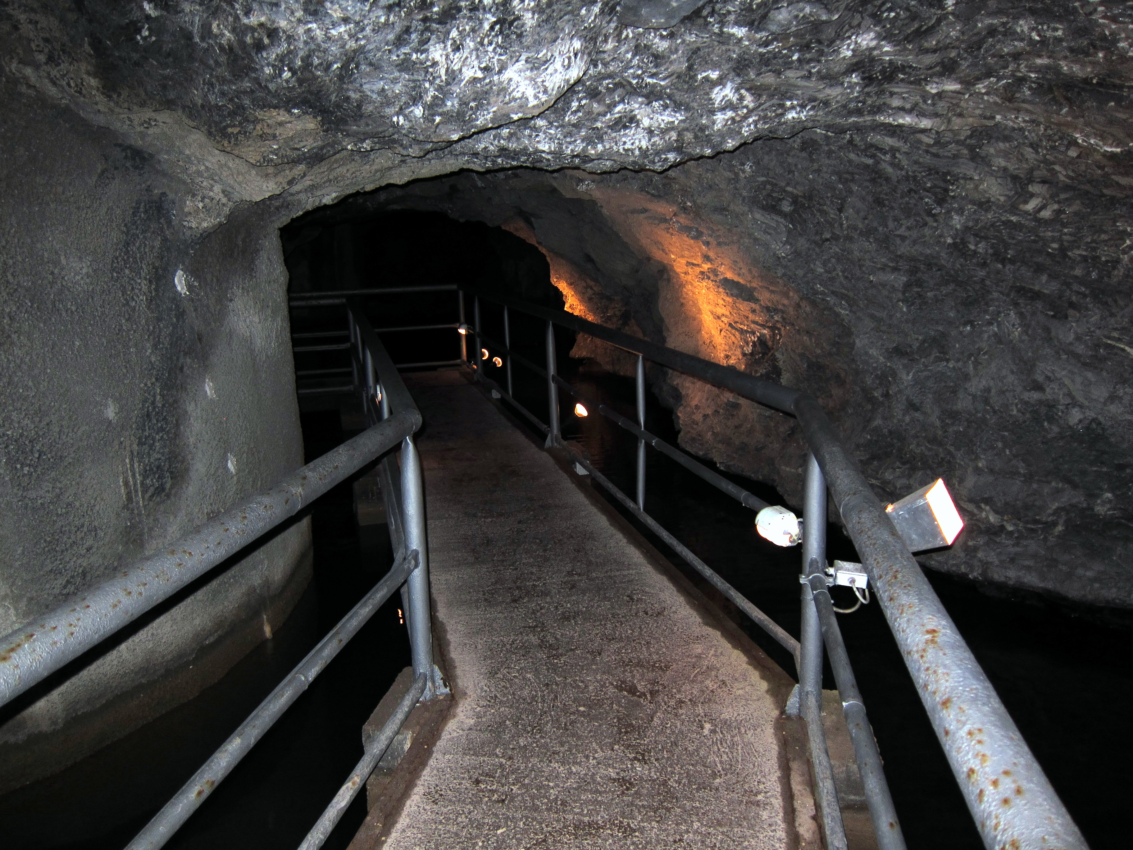 Marienglashöhle